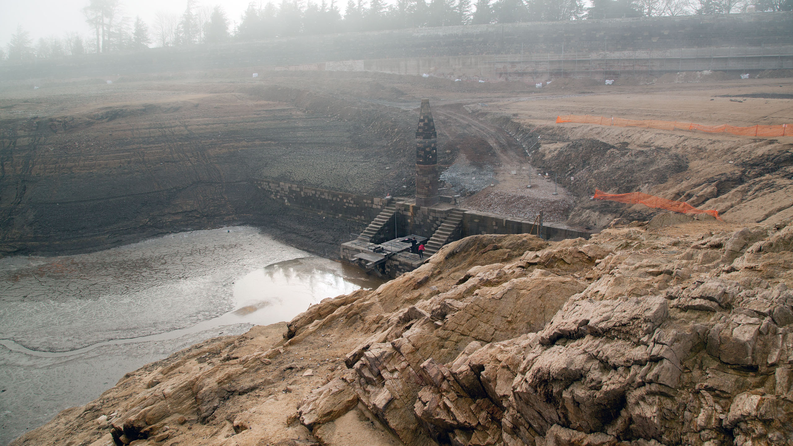 Fond du lac